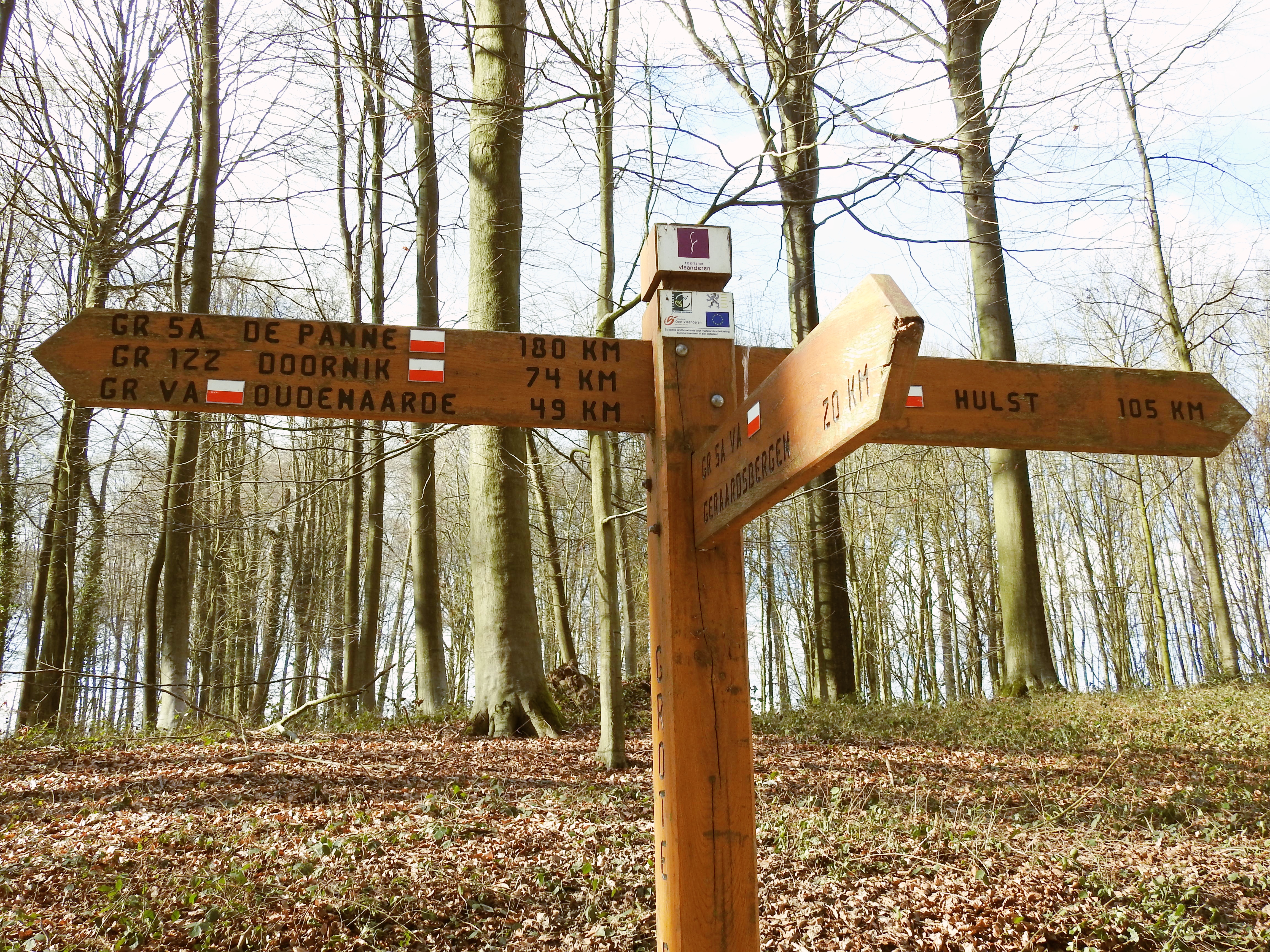 Wandelboom Brakelbos